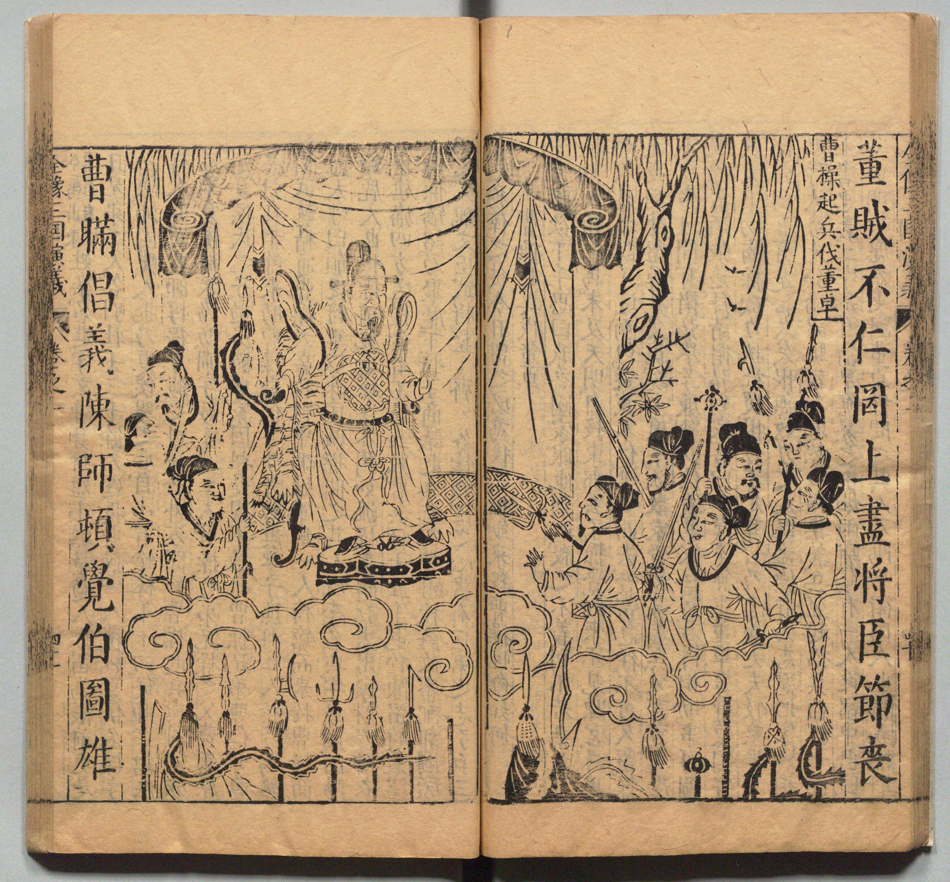 《新刊校正古本大字音释三国志通俗演义》 明万历十九年书林周曰校刊本